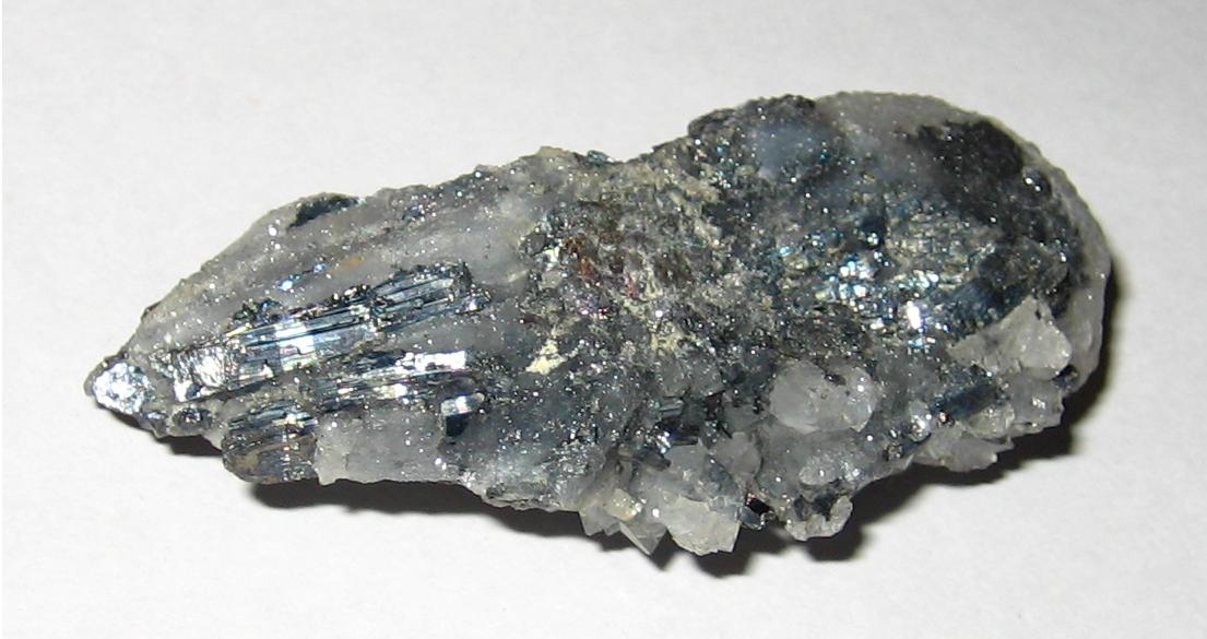 Puhdasta antimonia luonnosta kiteytyneenä kvartsiin.